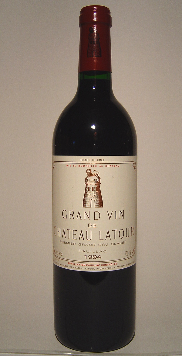 1994er Château Latour, Première Grand Cru Classé